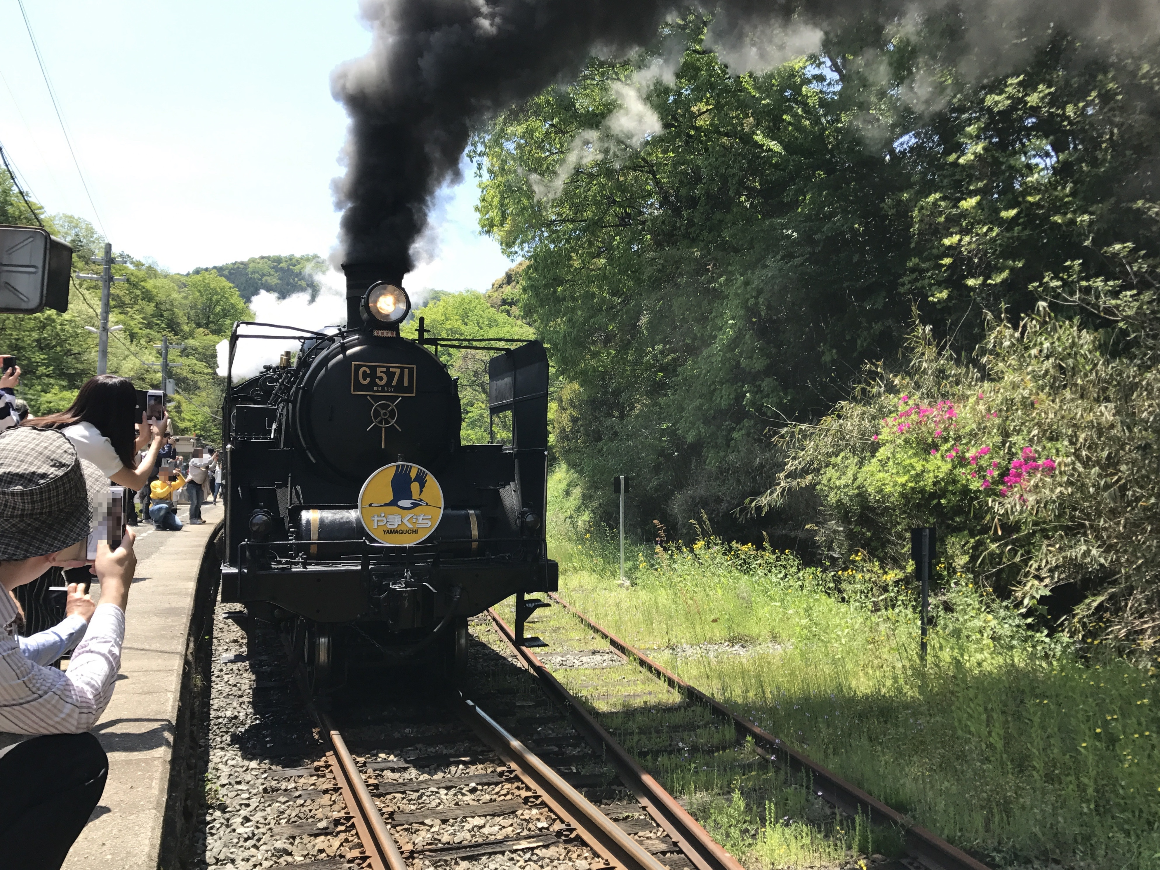 仁保駅にて山登り準備中の特急「SLやまぐち号」